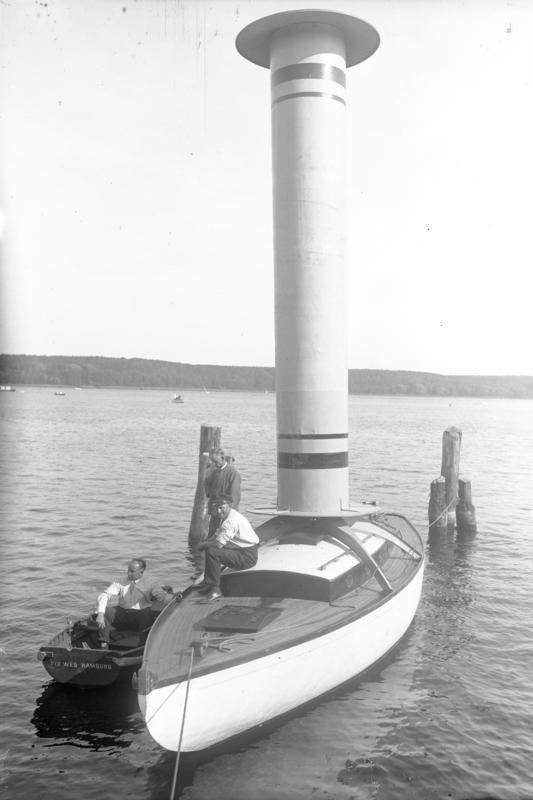 Der Flettner-Rotor auf einer Segel-Yacht! Die Rotor-Yacht mit dem imposanten Aufbau des Flettner-Rotors auf den Gewässern des Wannsees.